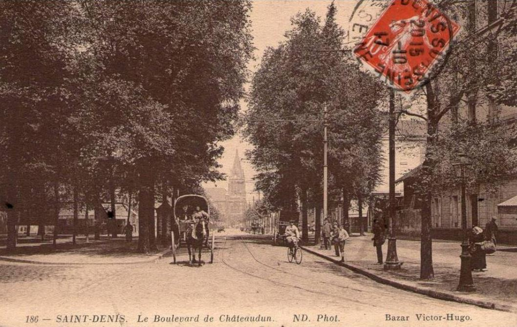 Boulevard de Chateaudun à Saint-Denis